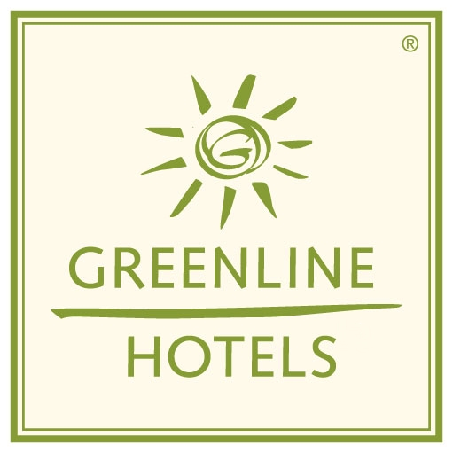 Das Bild zeigt das offizielle Logo der Hotelkooperation GreenLine Hotels